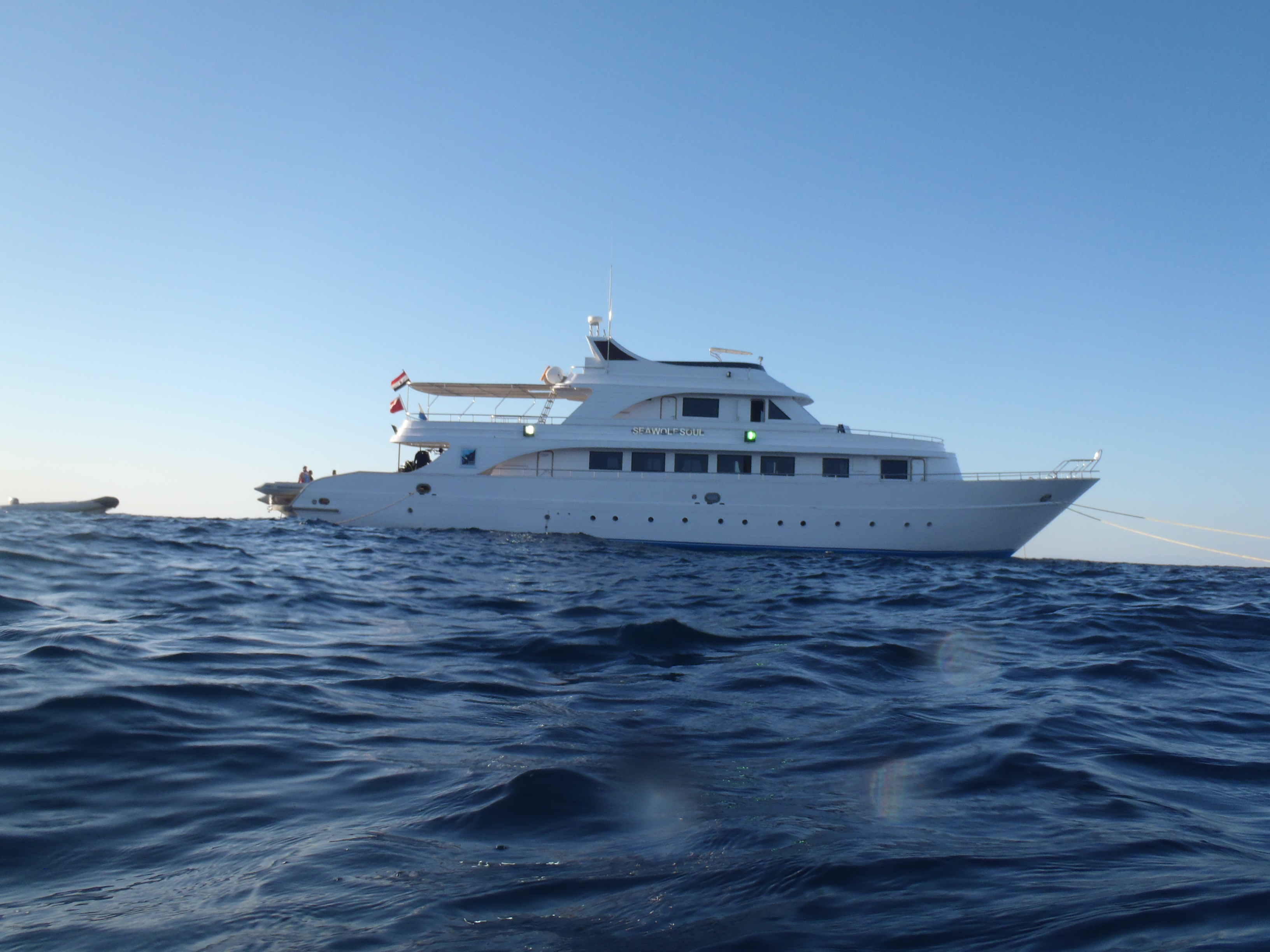 Die Seawolf Soal, ein Tauchsafariboot im Roten Meer